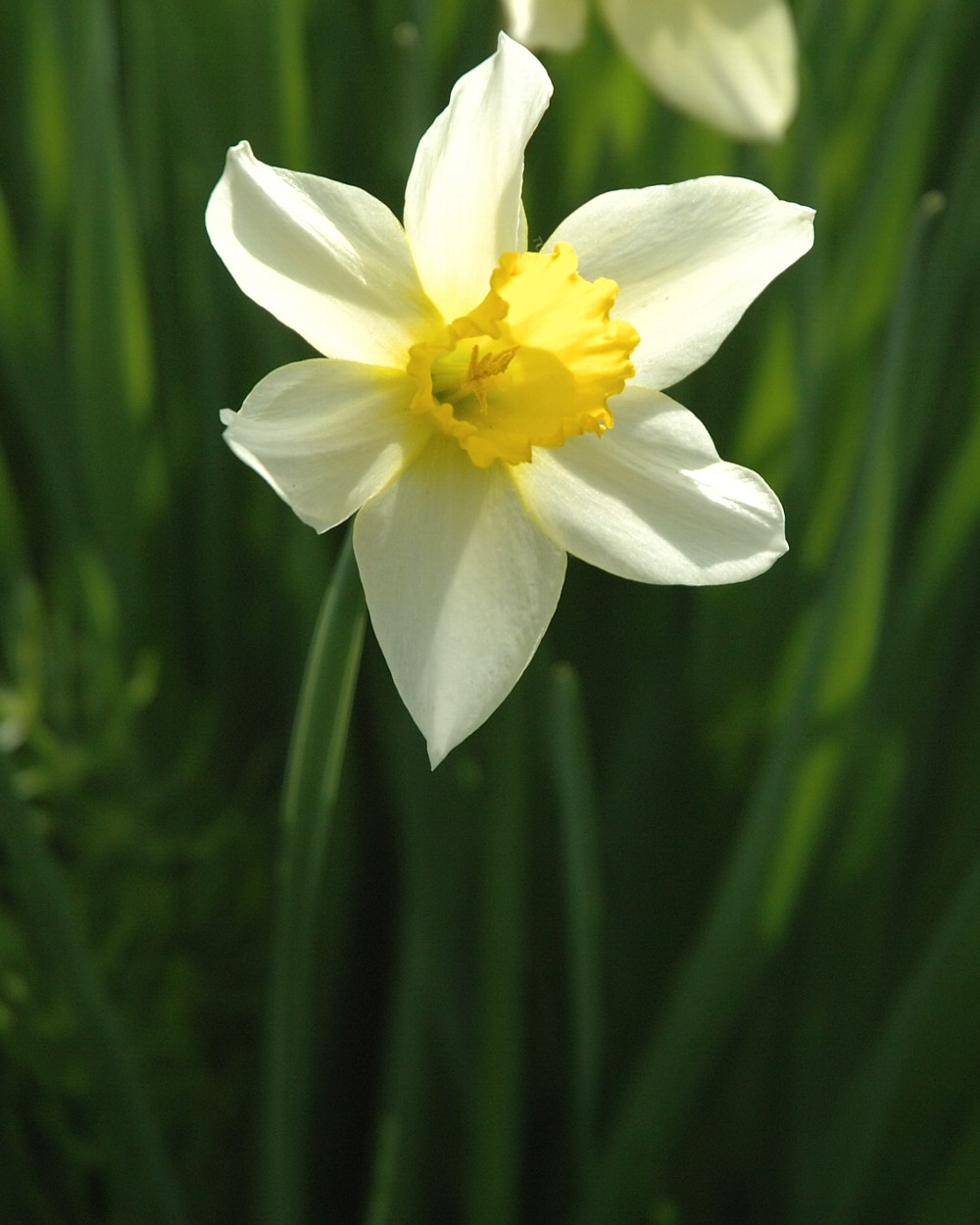 Narcissus (Narcissi,スイセン)